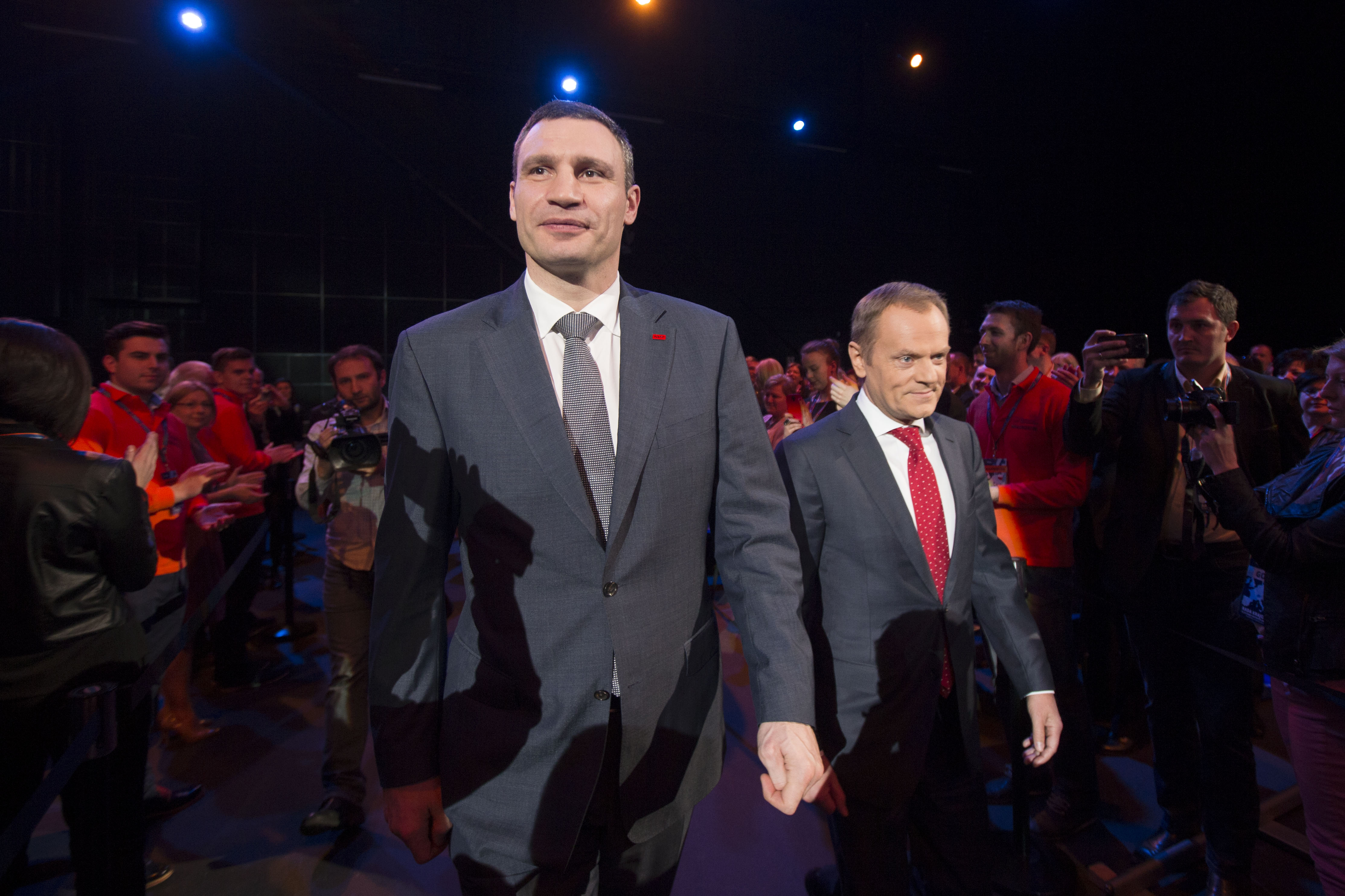 Rada Krajowa Platformy Obywatelskiej RP [22 marca 2014]